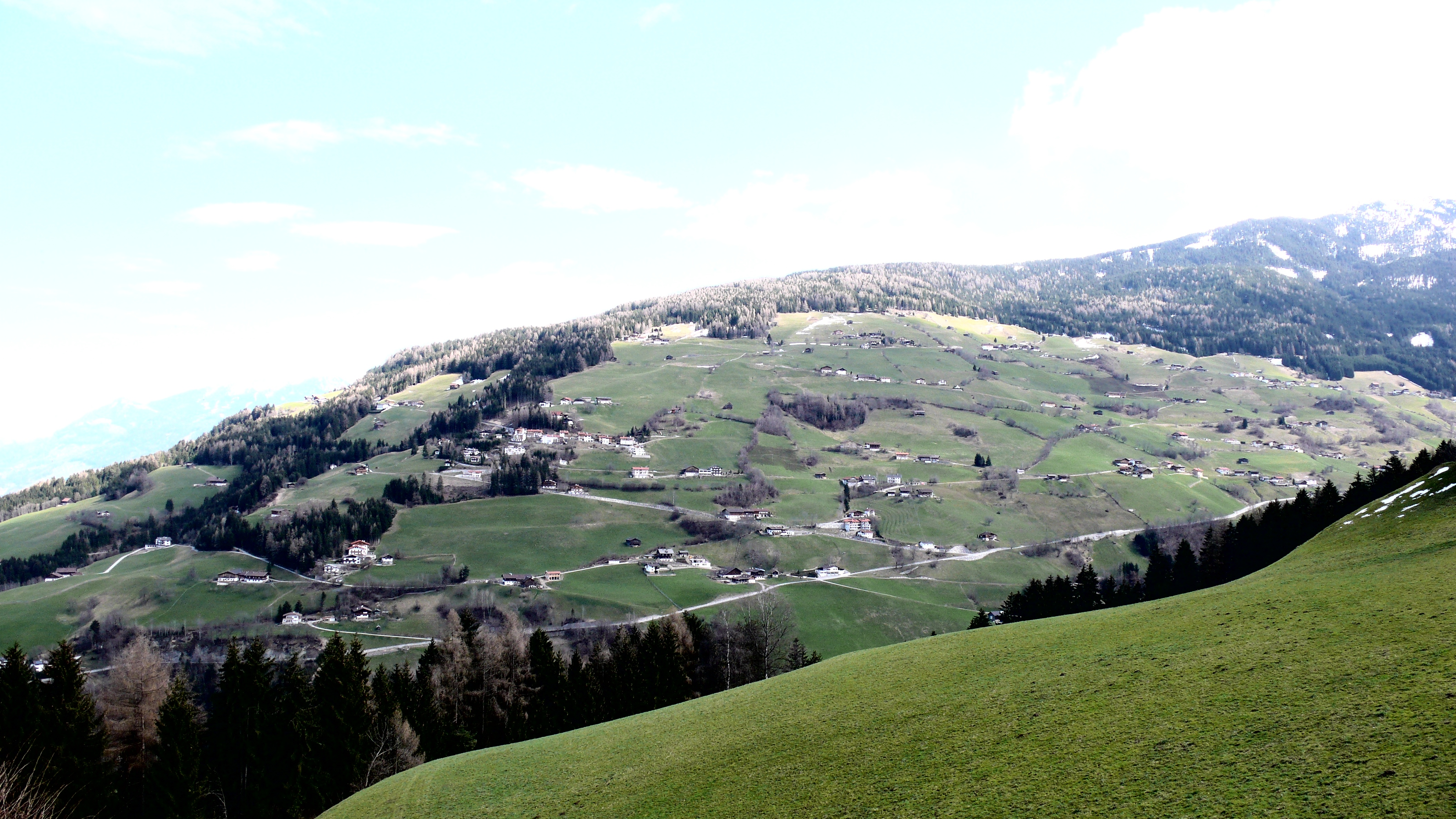 Wattenberg